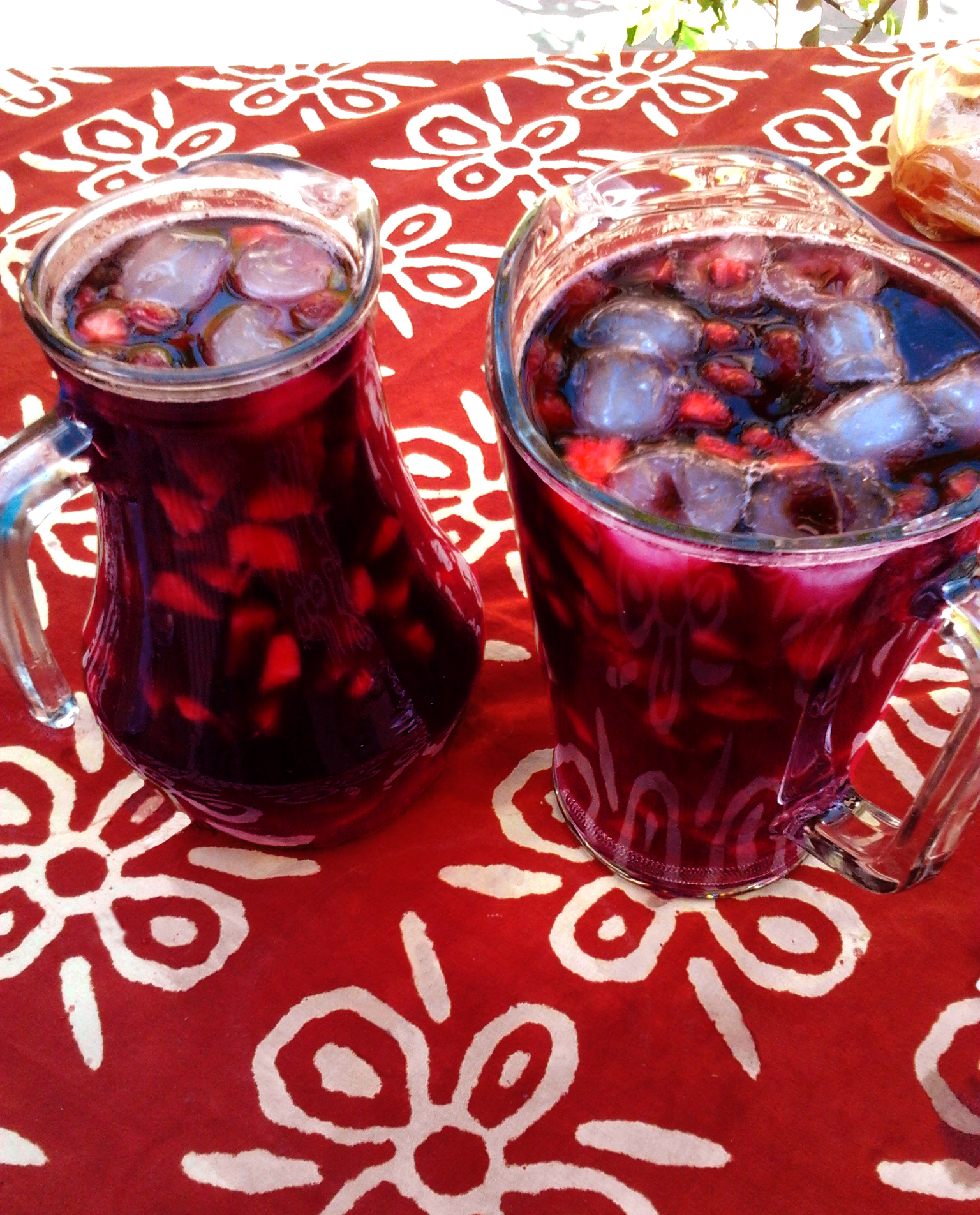 Jarra del trago chileno Borgoña, a base de vino tinto, frutillas y azúcar